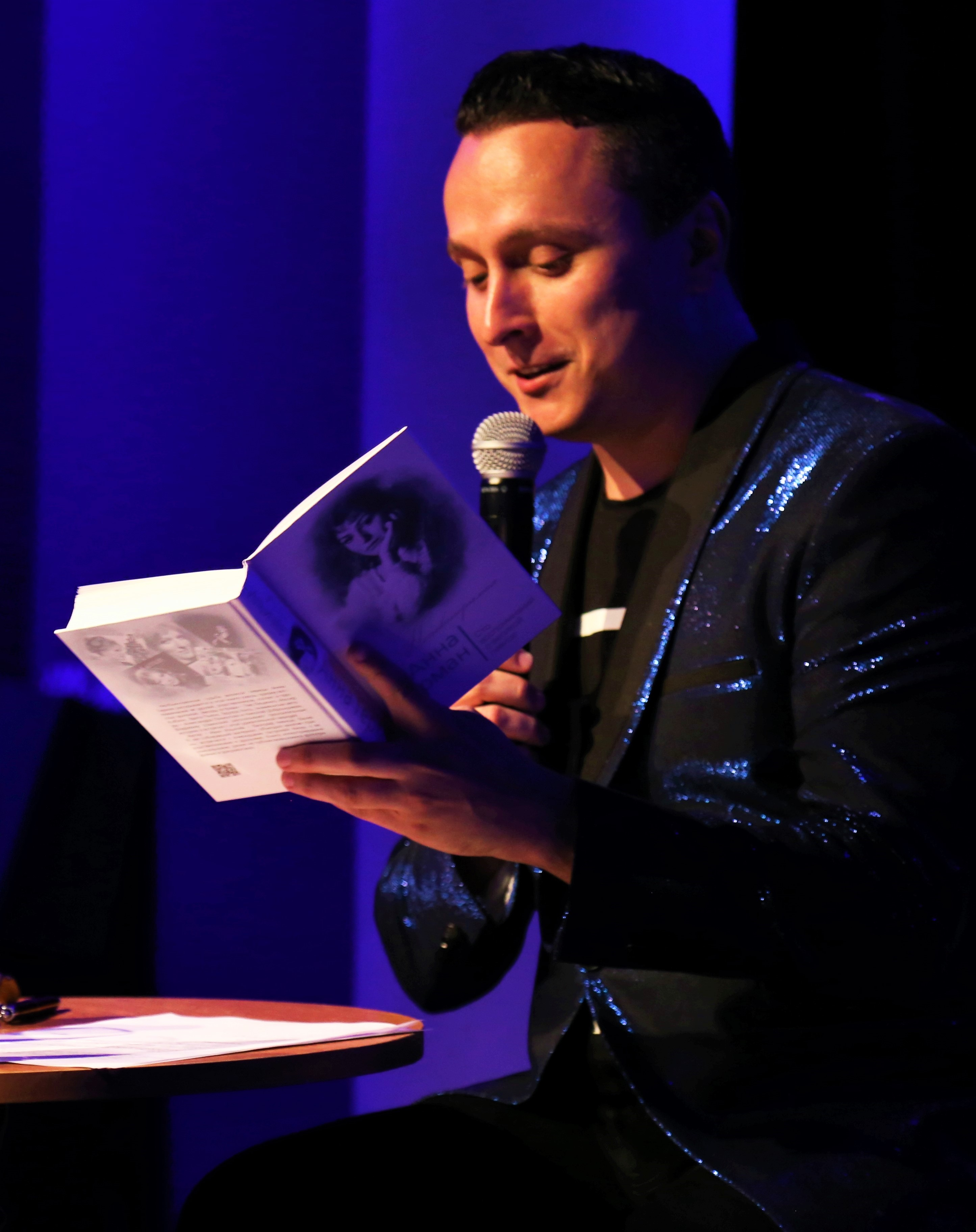 Иван Михайлович Ильичёв